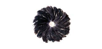 Antistatik-Bürsten haben einen Besatz aus Edelstahlgarn oder Carbonfasern. Über eine Aluminium-Fassung wird die aufgenommene Spannung durch einen Erdungsdraht zum Nullleiter oder Maschinenkörper abgeführt. Straußenfeder-Bürsten können für Arbeiten mit Objektkontakt eingesetzt werden, ohne die geringsten Spuren selbst auf hochempfinlichen Oberflächen zu hinterlassen.